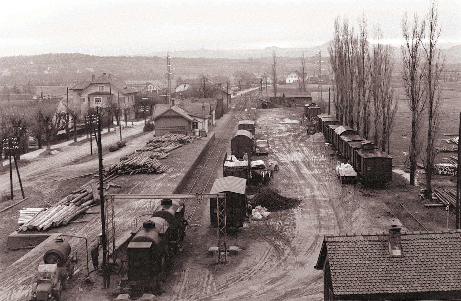 Železniška postaja Slovenska Bistrica.